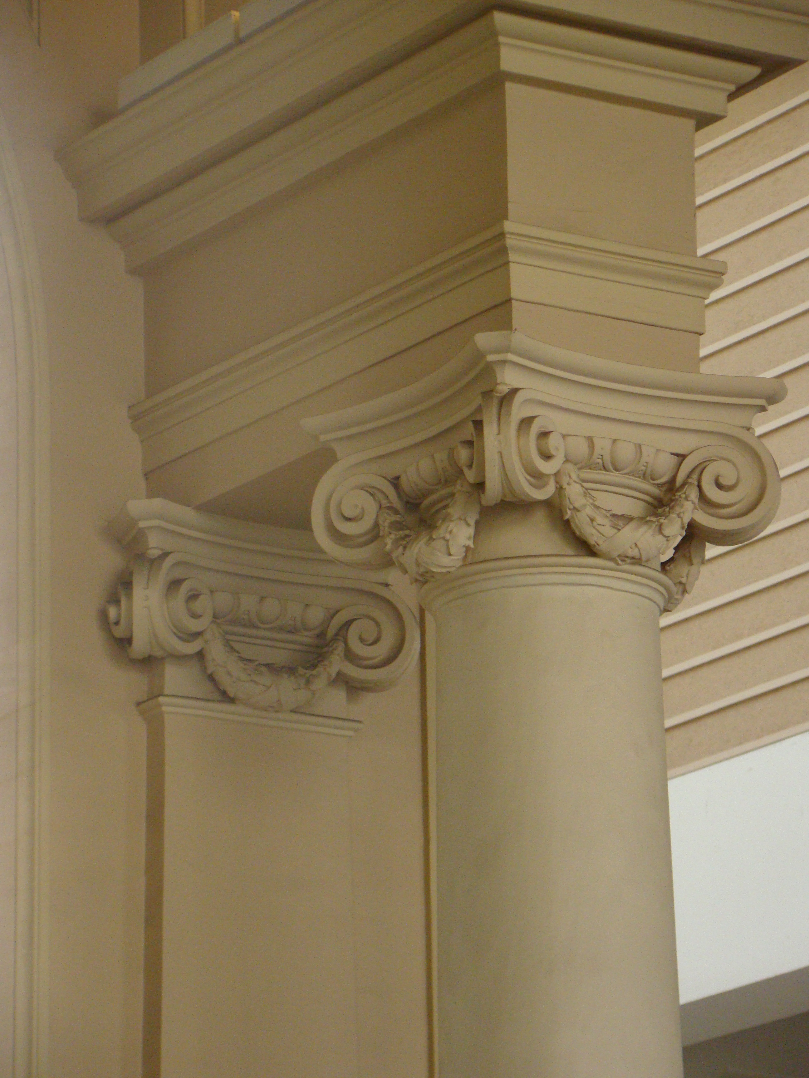 Detalhes das colunas no interior do Palácio dos Correios, em São Paulo (SP), Brasil.